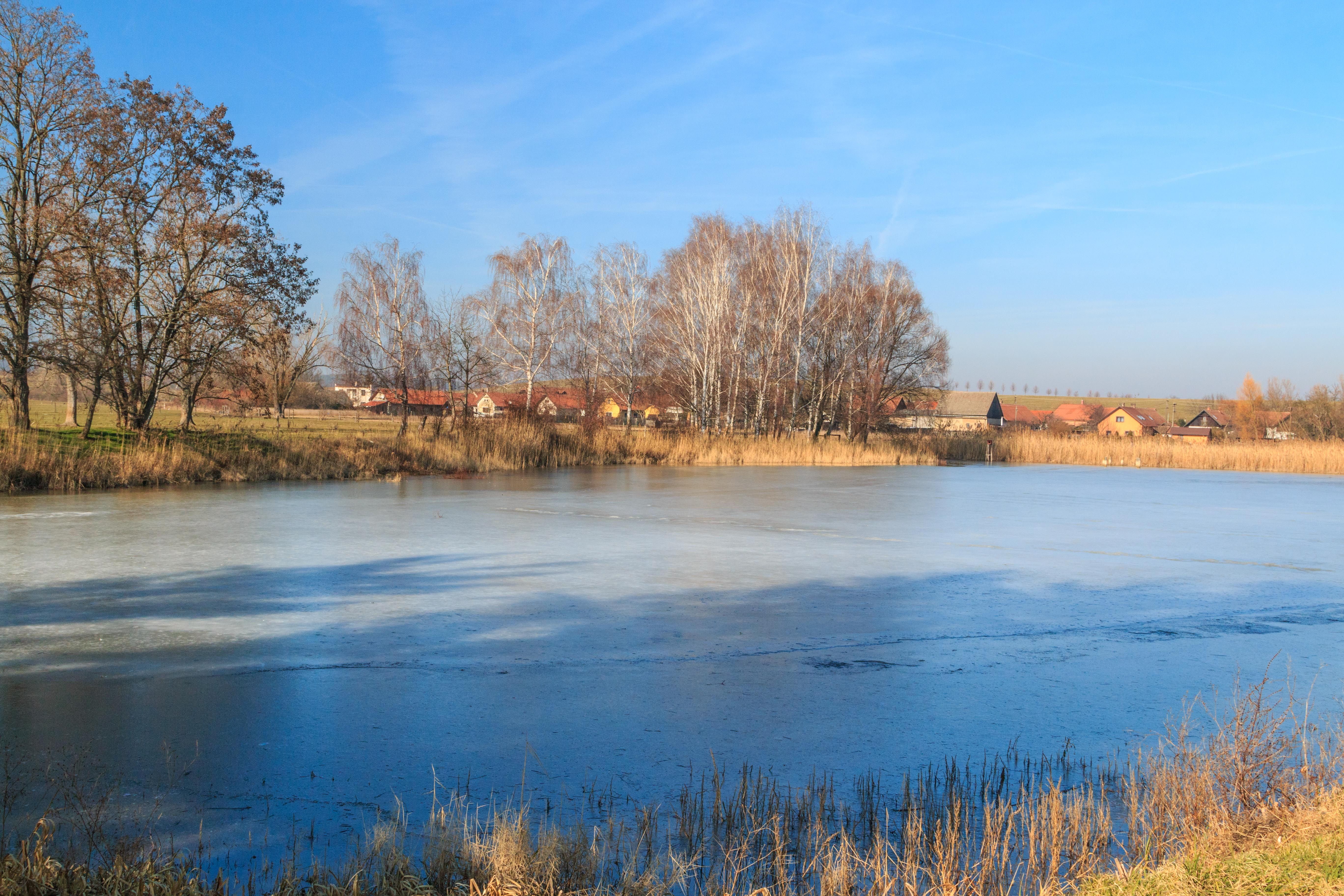 Pohled na Pojedský rybník Project: Vodstvo Ticket: 1711.